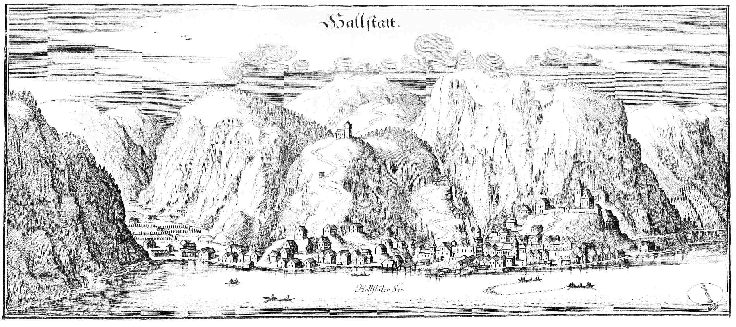 Hallstadt nach einem Stich von Matthaeus Merian (1656)